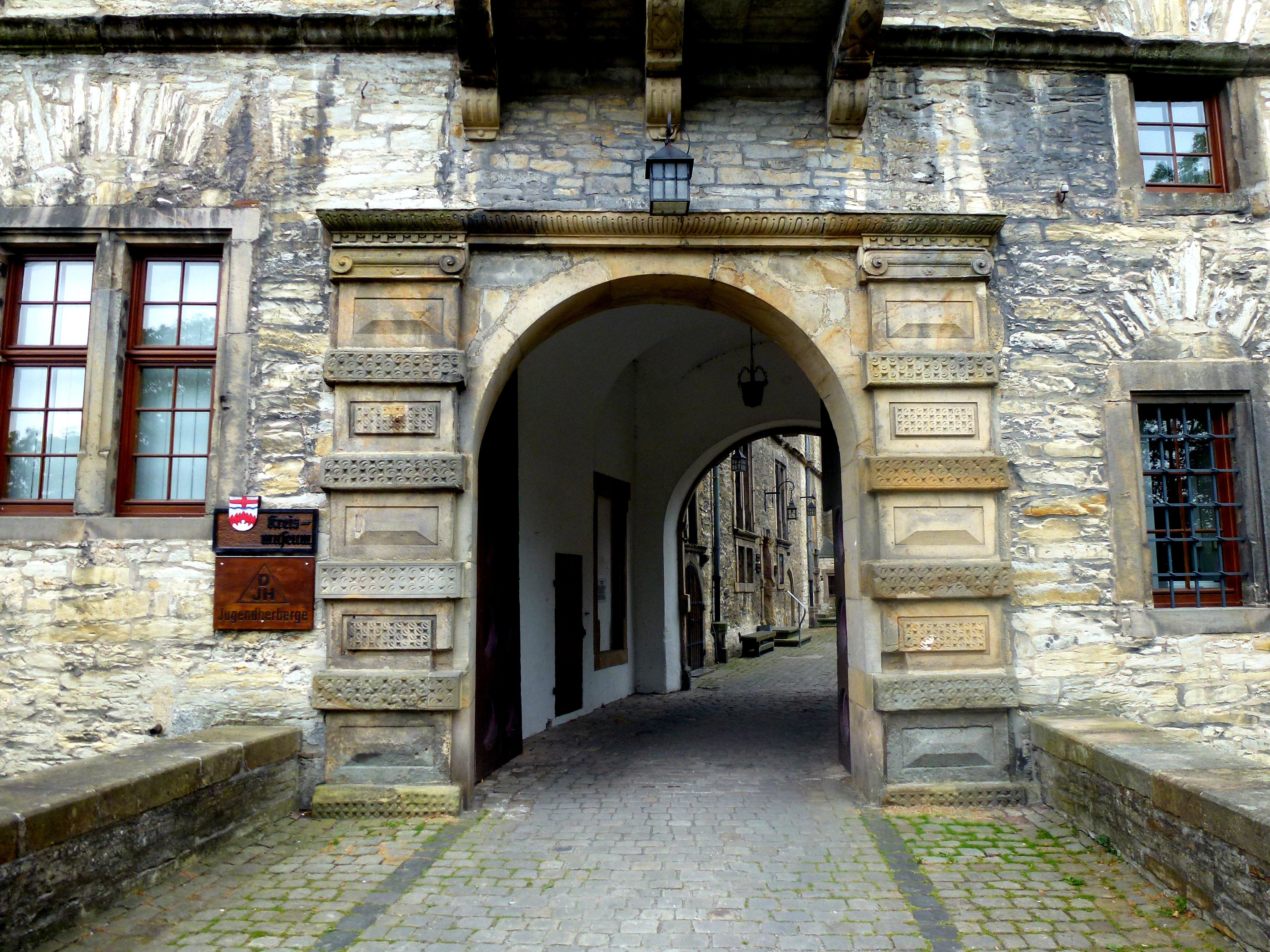 Wewelsburg Ansicht Eingang zum InnenhofThis is a photograph of an architectural monument., no. Büren 12/2